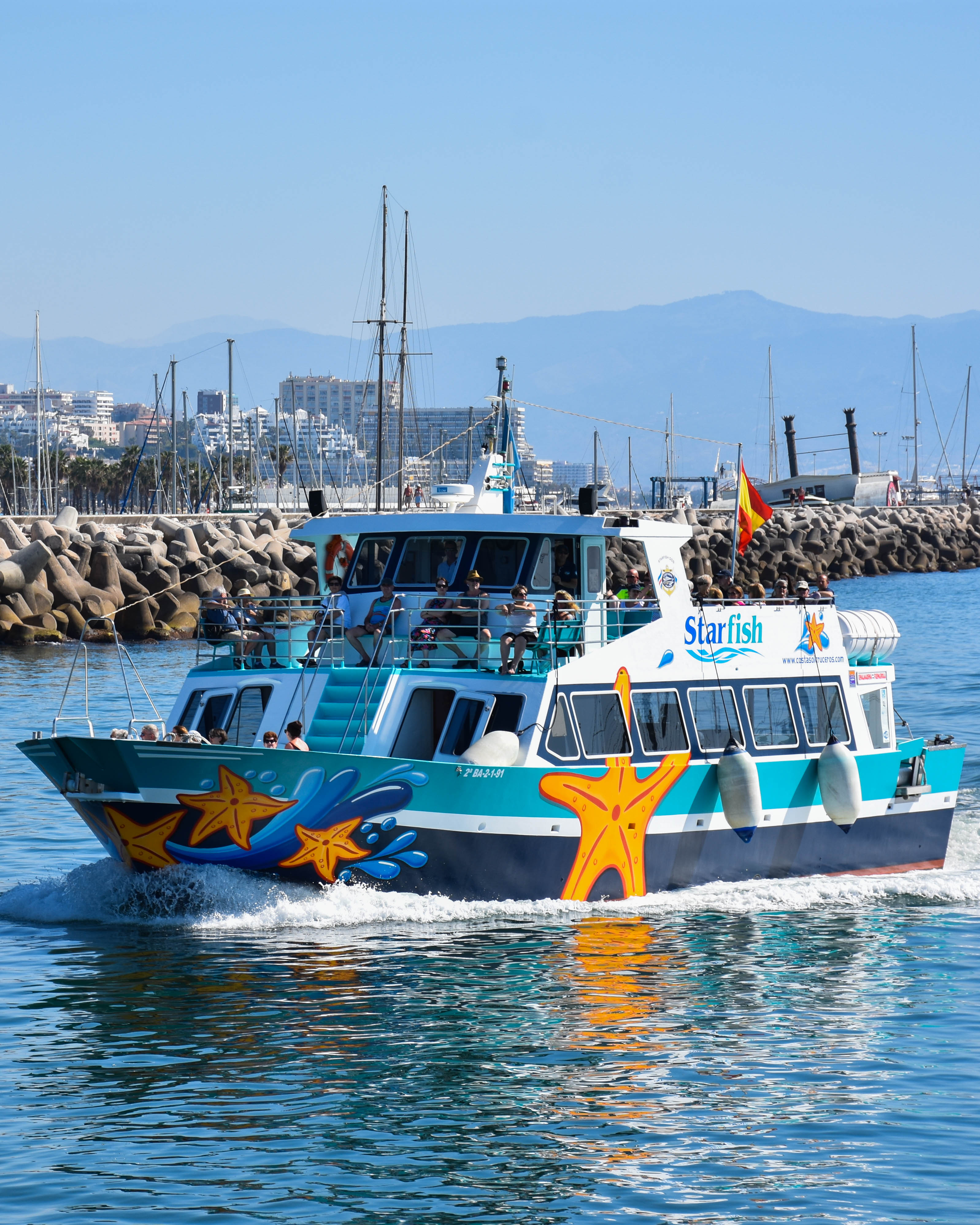 Llegando del paseo de Costa.